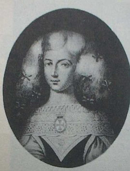 Dona Inês de Castro